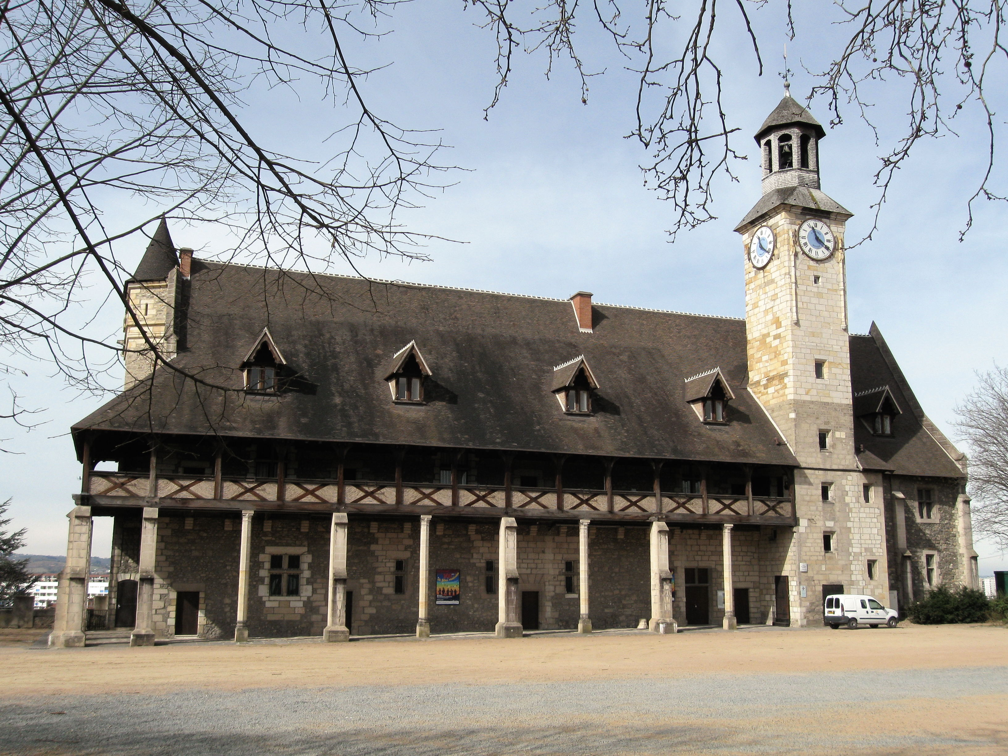 Château des Ducs de Bourbon, Montluçon, Allier, France